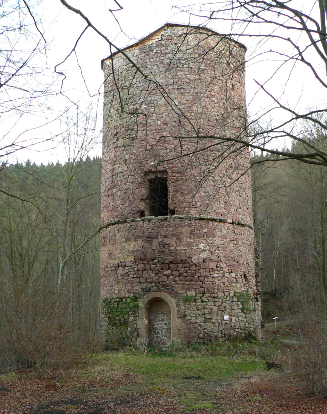 Bramburg